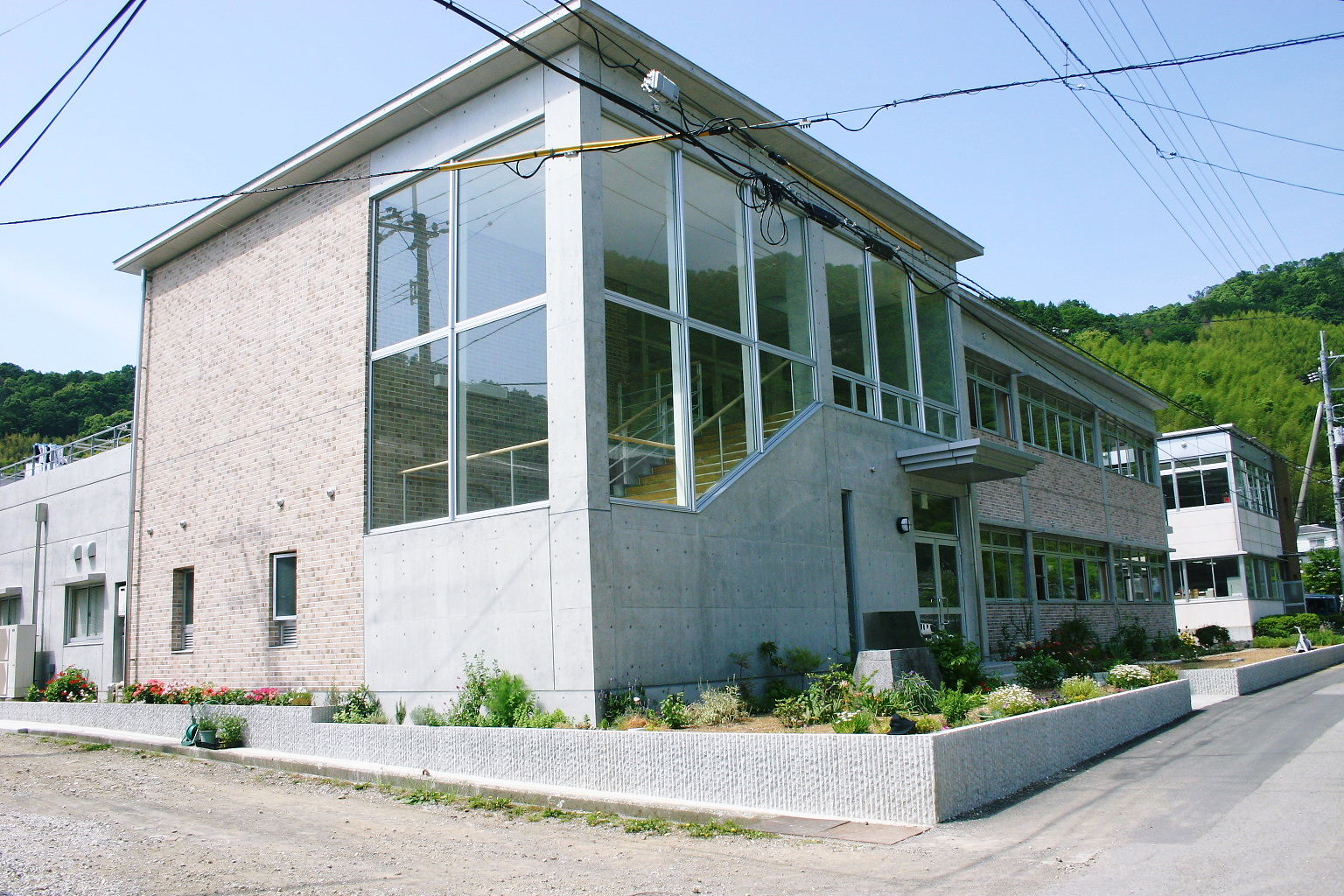 耐震化した光の村養護学校土佐自然学園新館